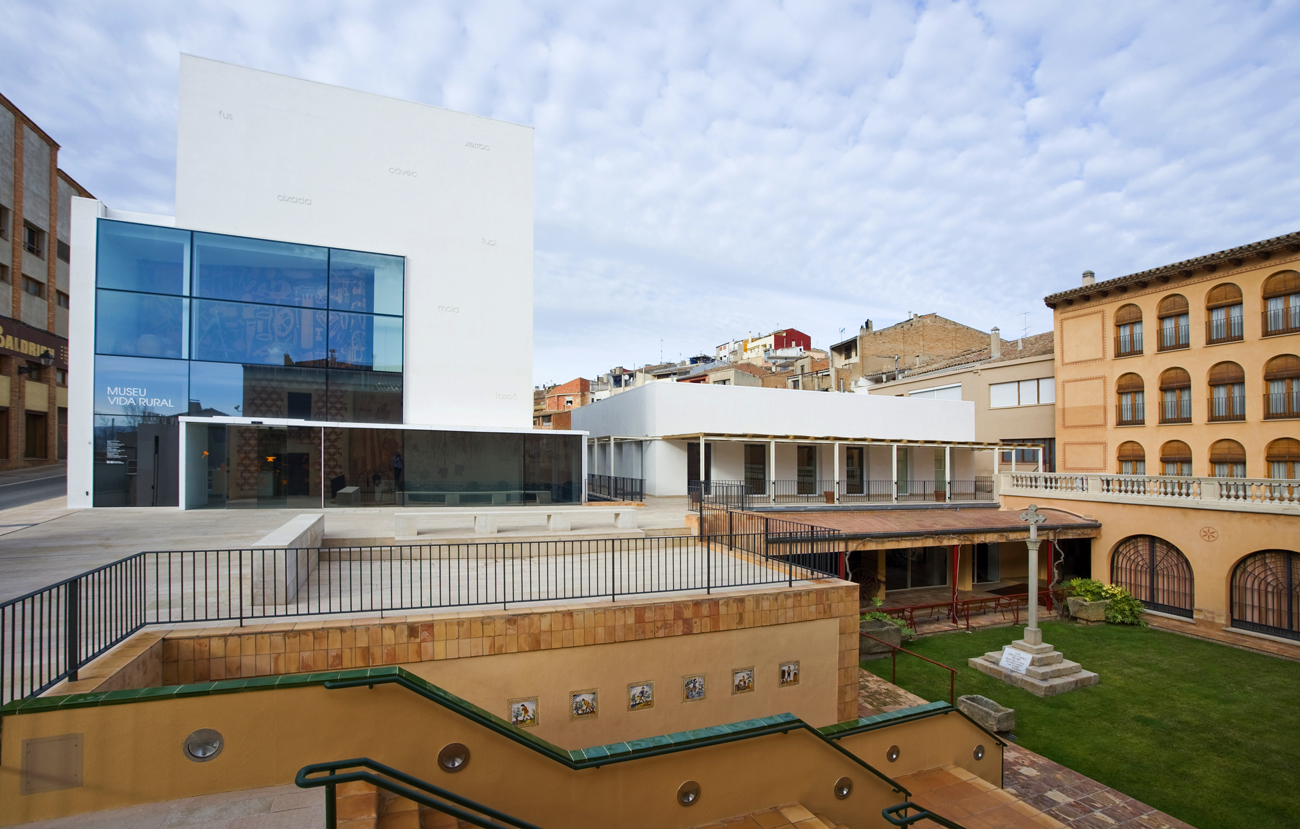 Els tres edificis del Museu de la Vida Rural. A la dreta l'edifici històric del MVR (s. XVIII, rehabilitat el 1988), a l'esquerra l'edifici nou del museu (2009); al mig l'edifici annex (2012).